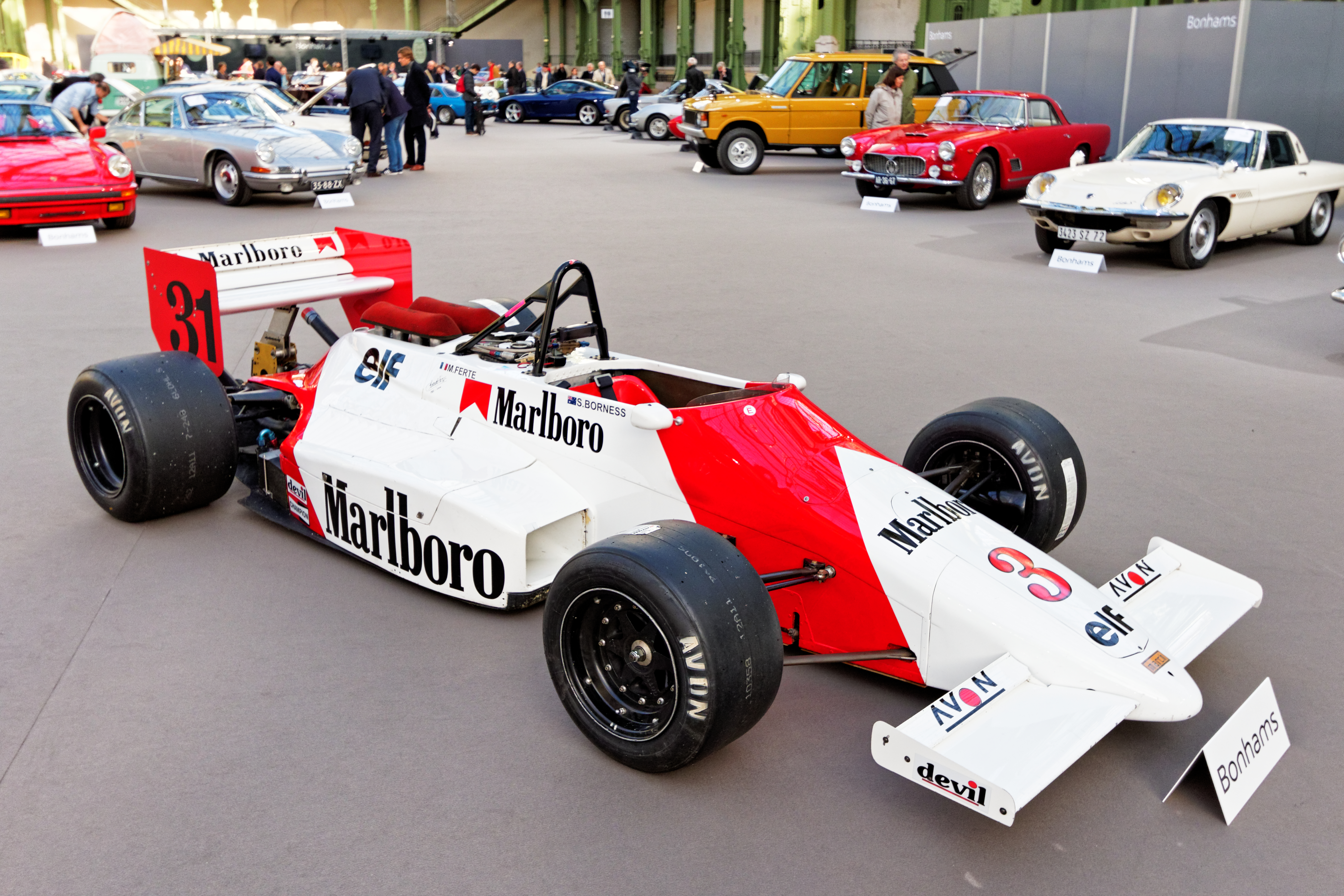 Un des véhicules présenté lors de la vente aux enchères Bonhams 2016 au Grand Palais de Paris.